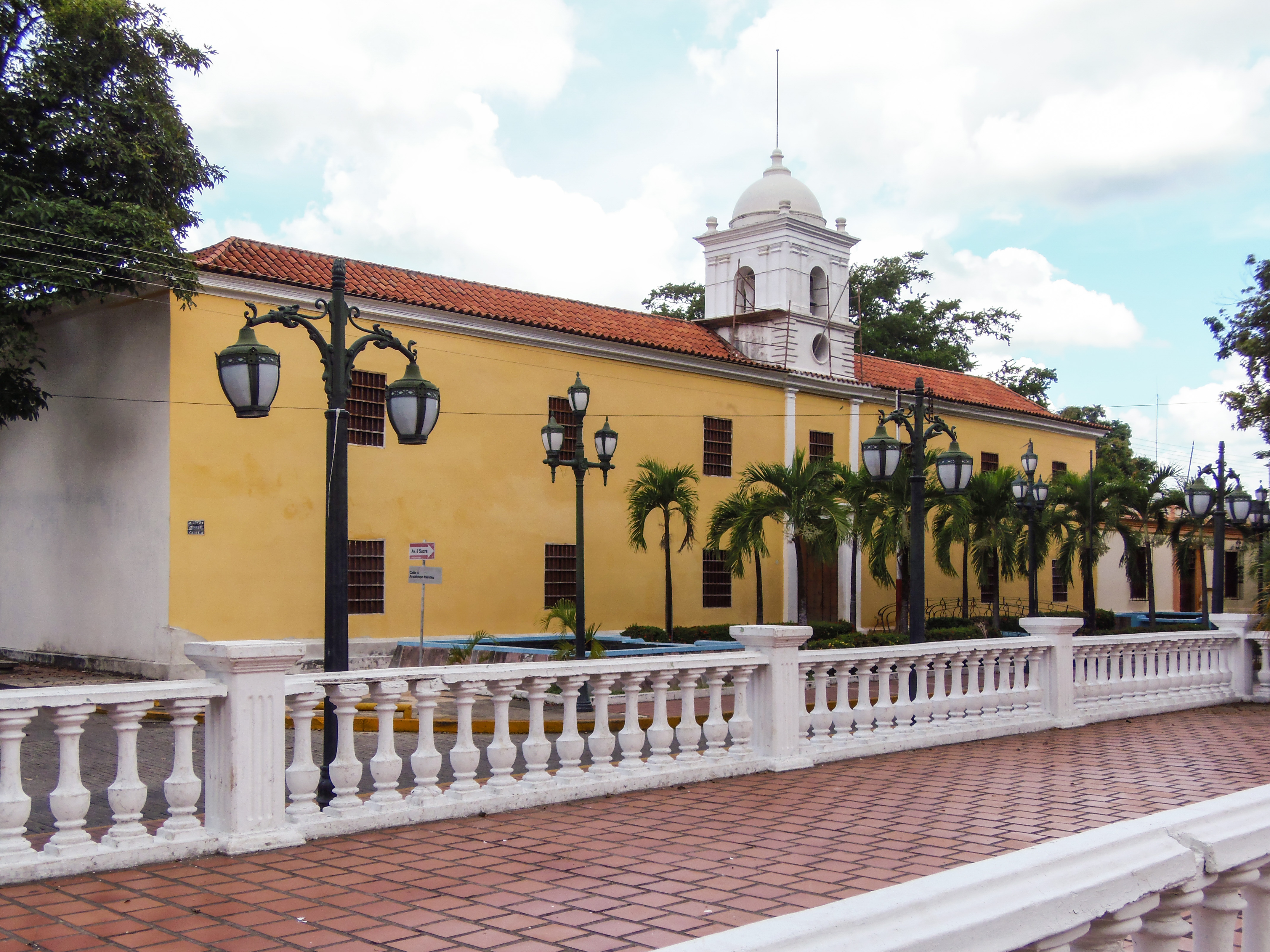 Casa de la cultura Napoleón Sebastián Arteaga